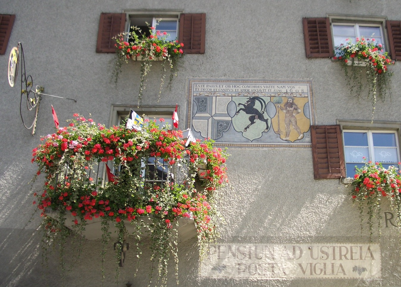 Zillis GR, Switzerland